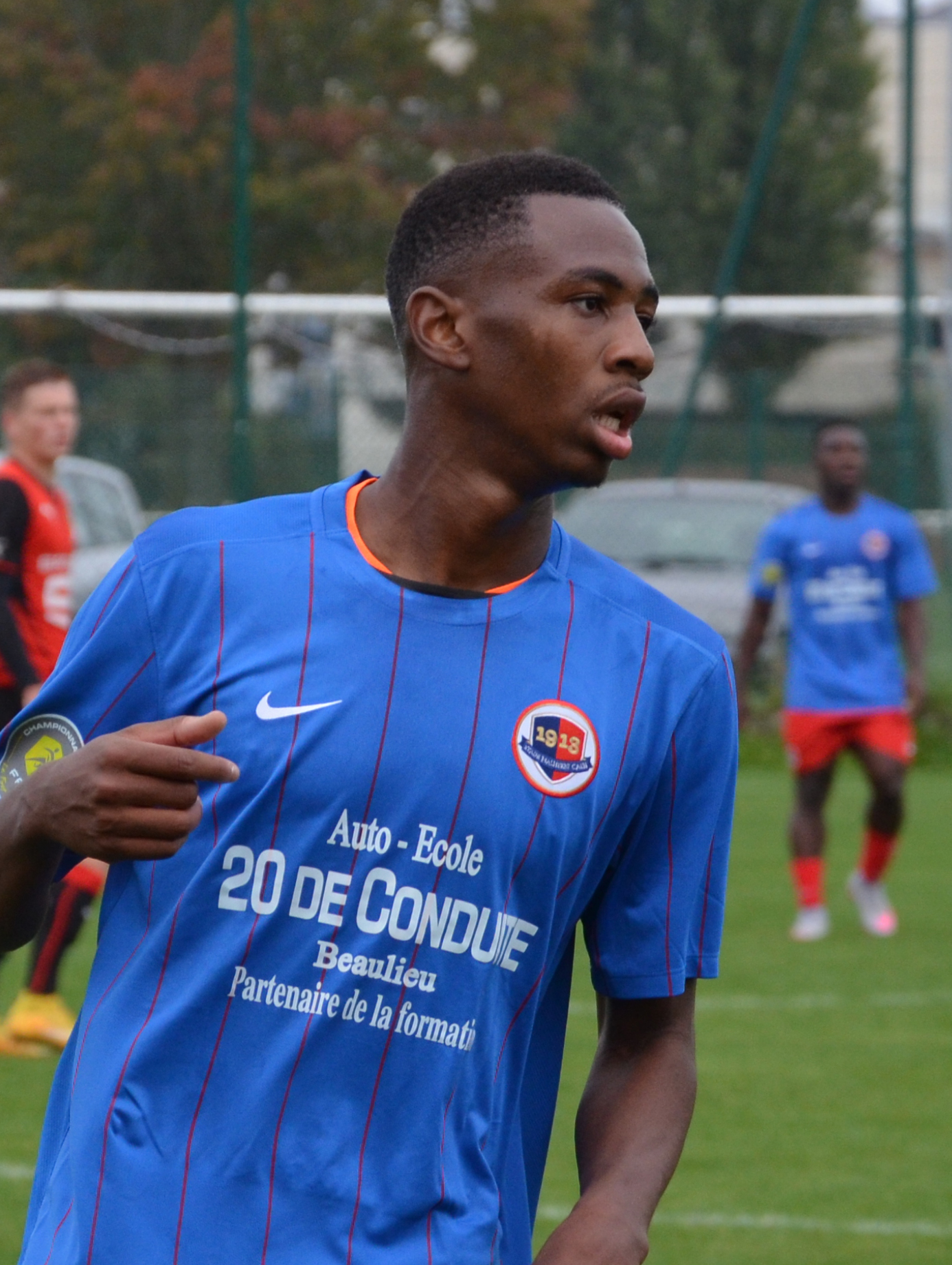 Photographie prise lors d'un match amical opposant les équipes réserves du Stade Malherbe de Caen et du Stade rennais sur l'un des terrains annexes du stade de Venoix le 13 septembre 2015. Ici, Jordan Nkololo.